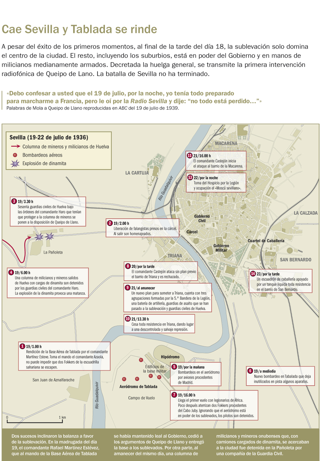 Infografía que narra los principales combates ocurridos en Sevilla entre el 19 y el 23 de julio de 1936. Página 37 del libro "La sublevación", de Víctor Hurtado (DAU, 2011).